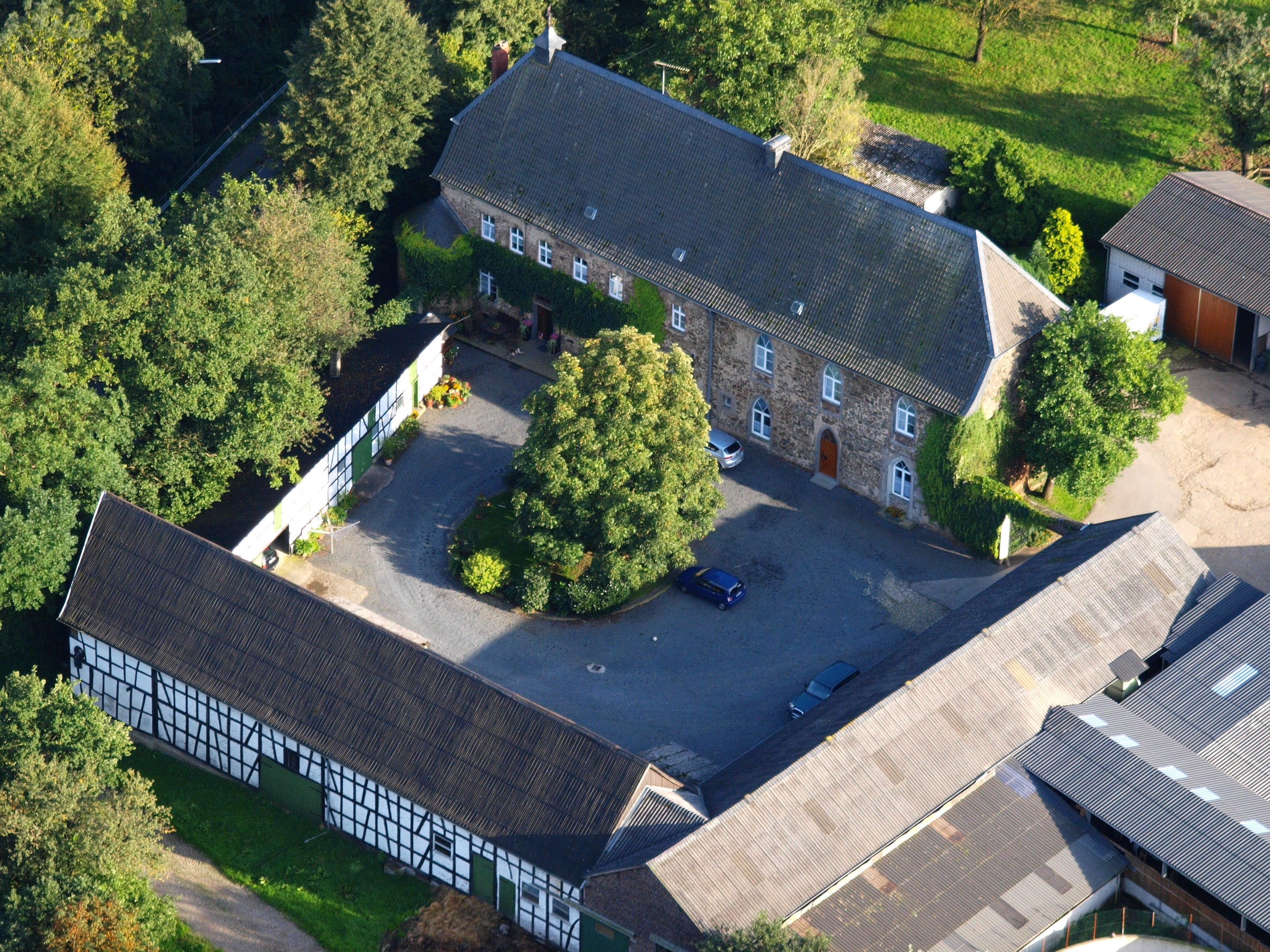 Haus Attenbach, Hennef (Sieg): Luftaufnahme